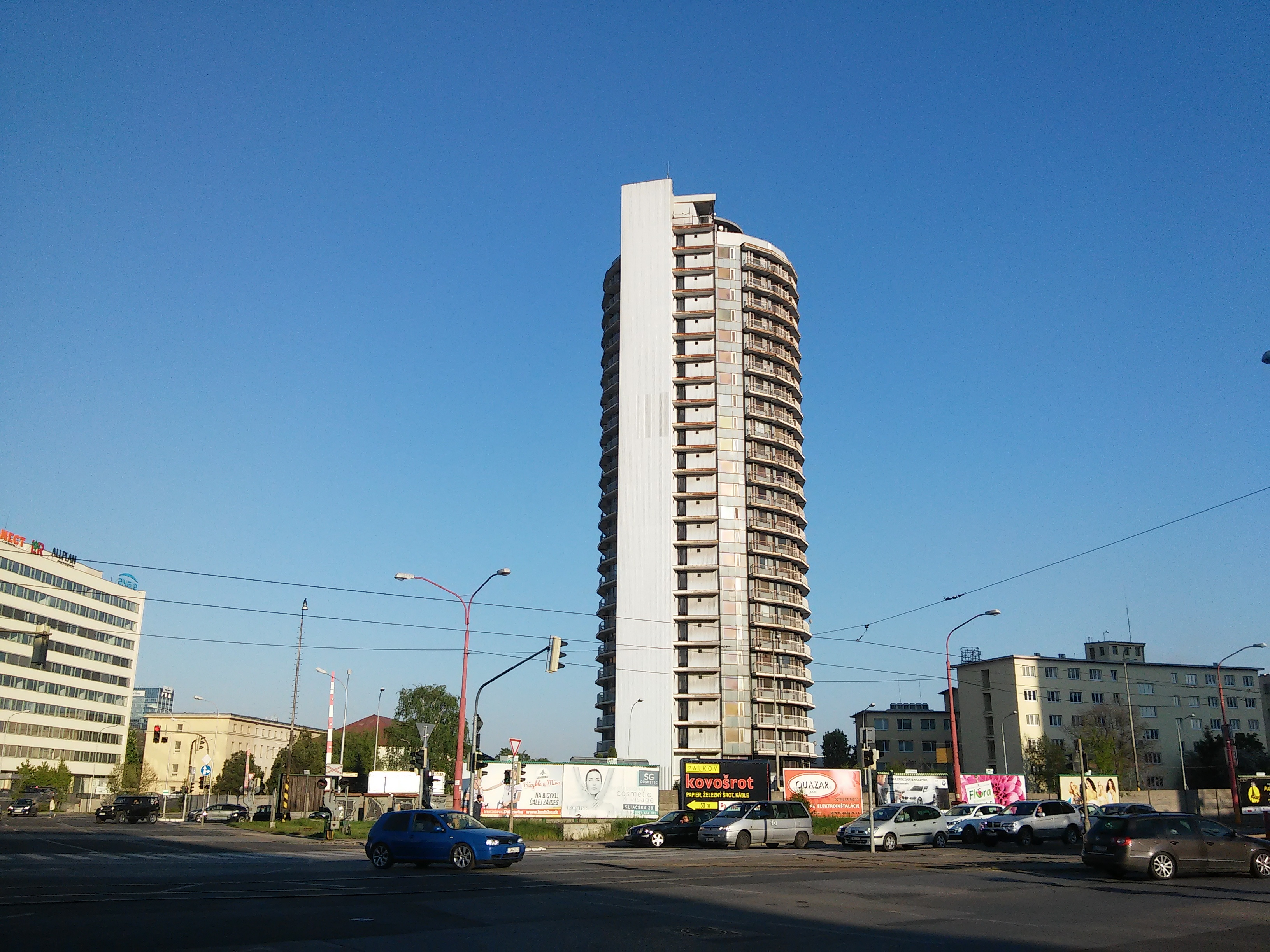 Hviezda, Kukučínova-Jarošova, Nové Mesto, Bratislava